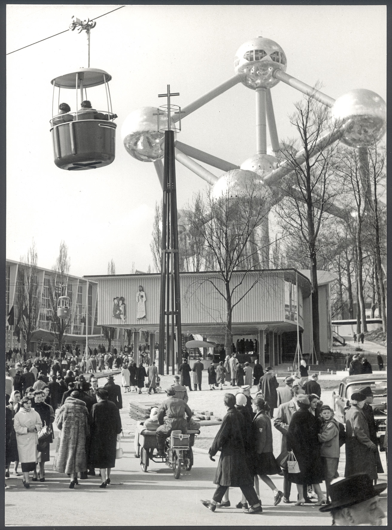 Ev. Pavillon auf der EXPO in Brüssel im Hintergrund Atomium 1958, Fotosammlung: Hans Lachmann, Kasten 2/36, Bestand: AEKR Düsseldorf 8SL 046 (Bildarchiv), 19_001